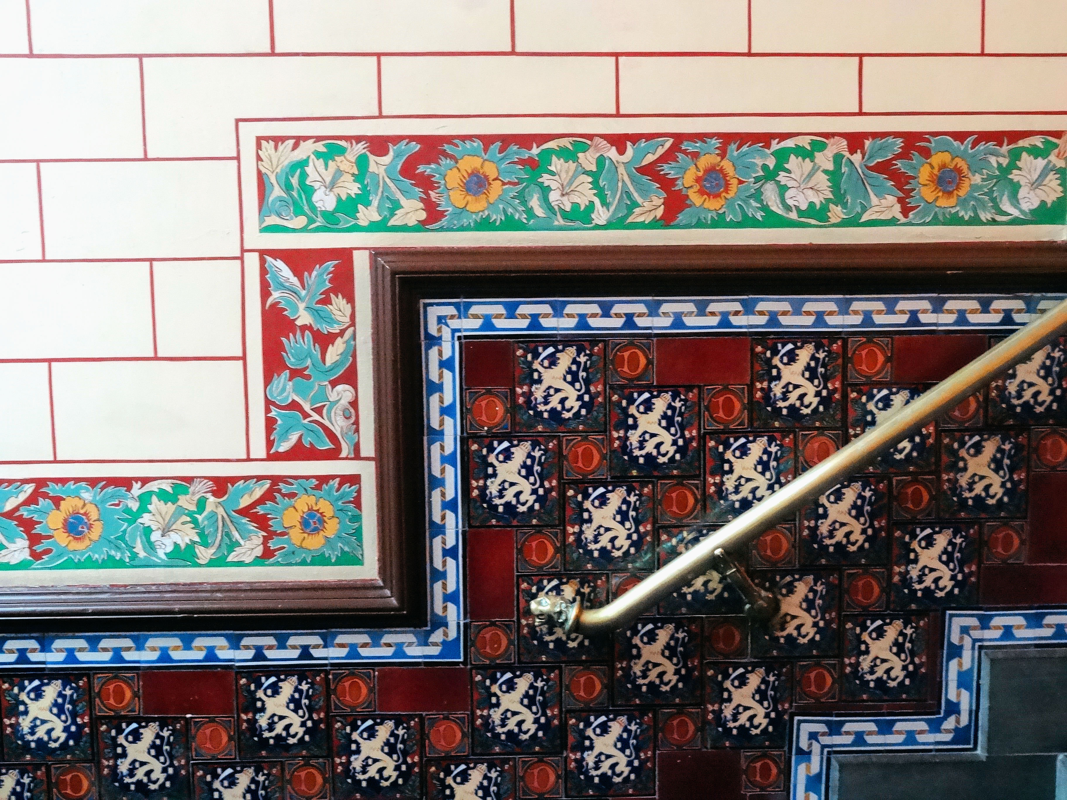 Detail interieur bovenverdieping van het Gouvernementsgebouw in Assen.